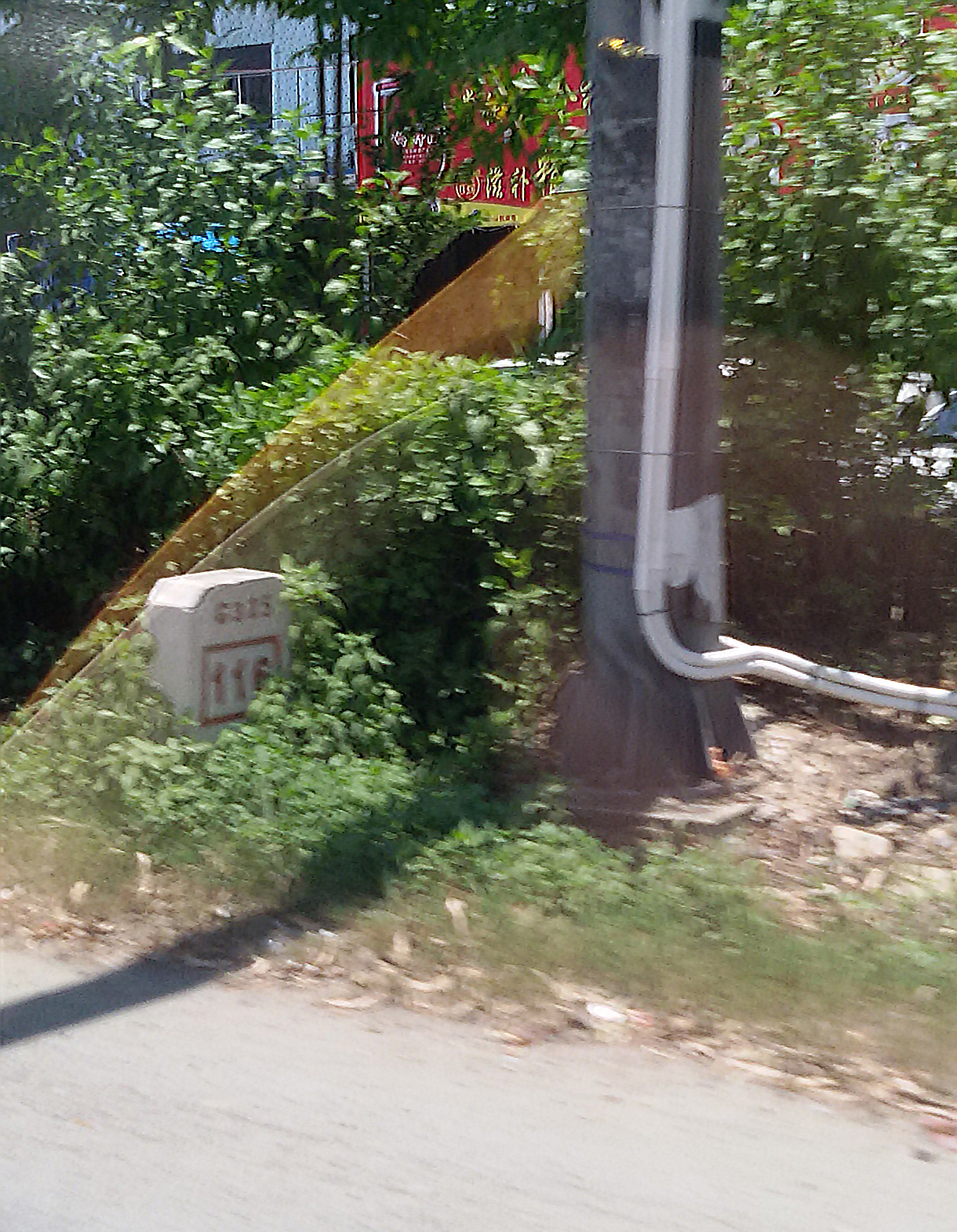 粵語: 325国道嘅116km公里牌標記